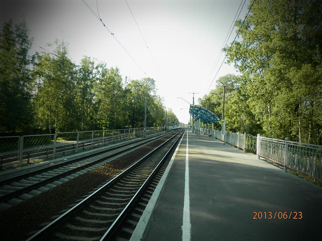 Платформа Озерки